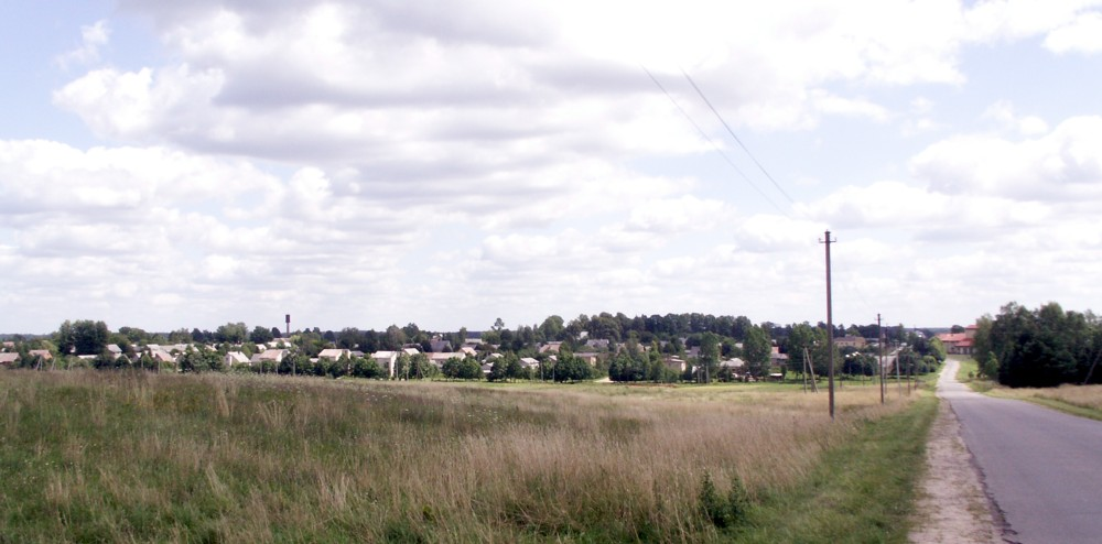 Bazilionai (arba Padubysys) – miestelis Šiaulių rajone